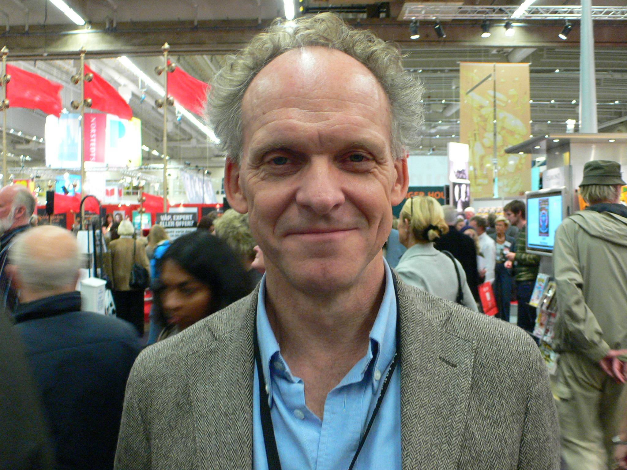 Ingvar Storm at Gothenburg Book Fair 2007, Ingvar Storm på Bok- och biblioteksmässan 2007